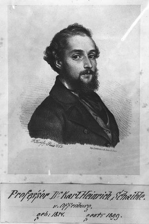 Karl Heinrich Schaible (1824-1899) - Mediziner und Revolutionär